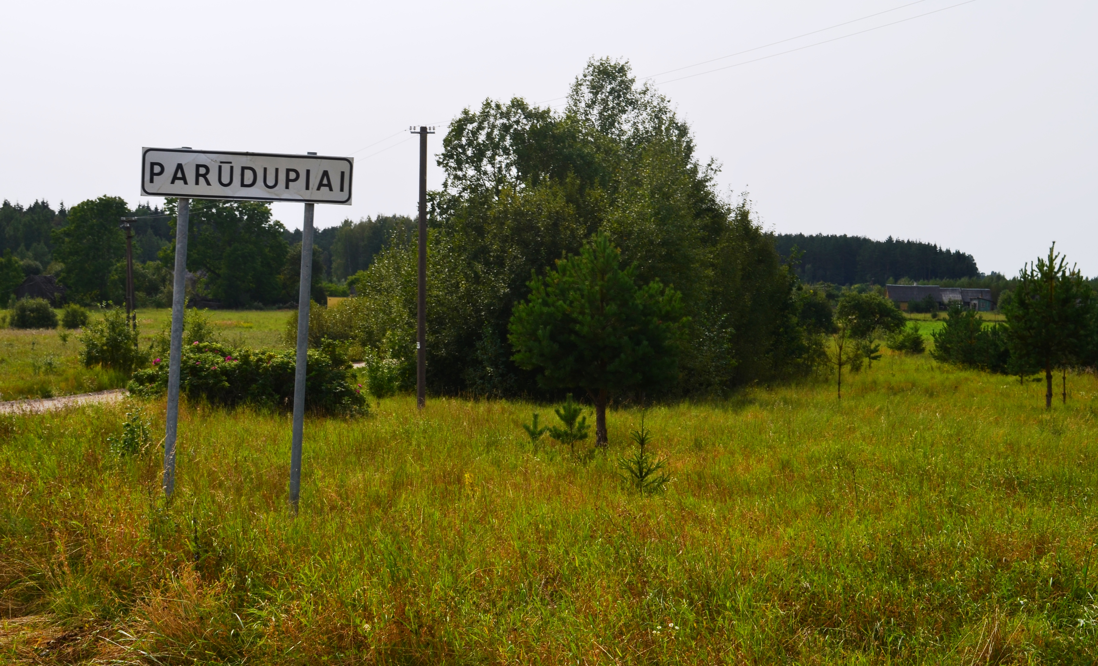 Parūdupiai, Mickūnų sen., Vilniaus raj.